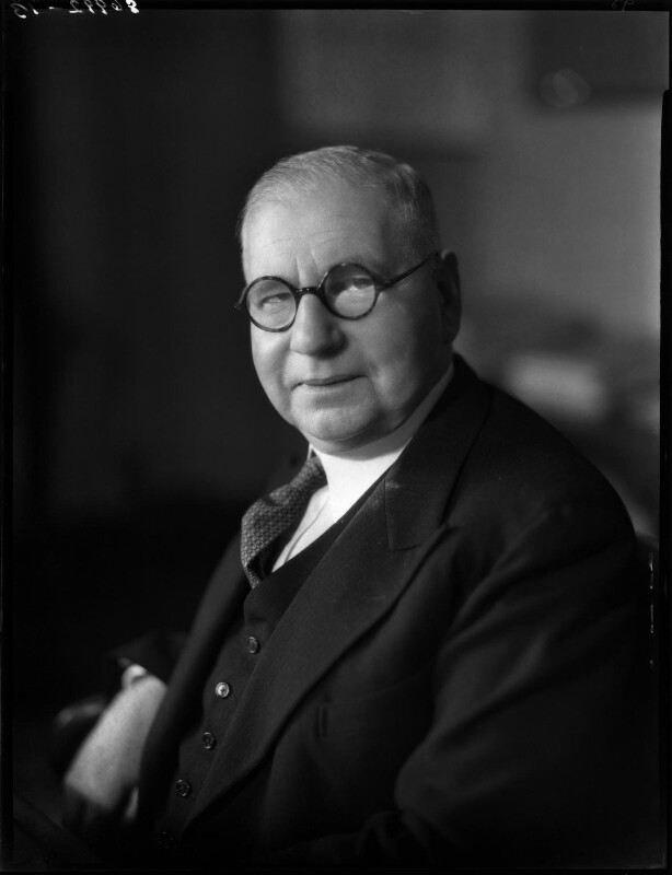 Walter Womersley